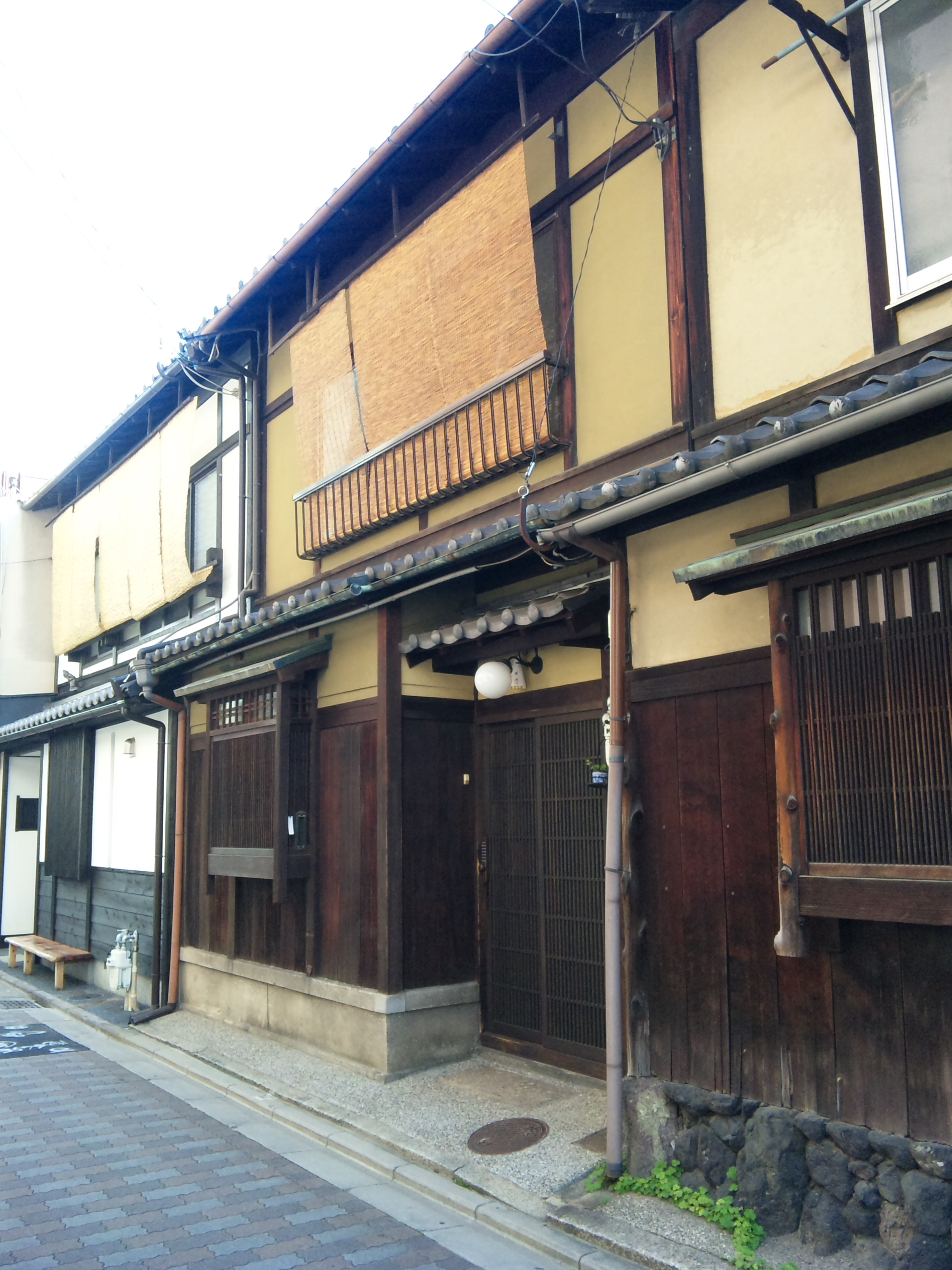 高瀬川に面した京町屋を一軒丸ごと宿として提供している。以前は店構えだったそうで、玄関を入ると帳場構造が残る。